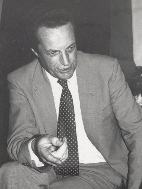 Eigen foto van Prof. Piet Kouwe gemaakt in 1979